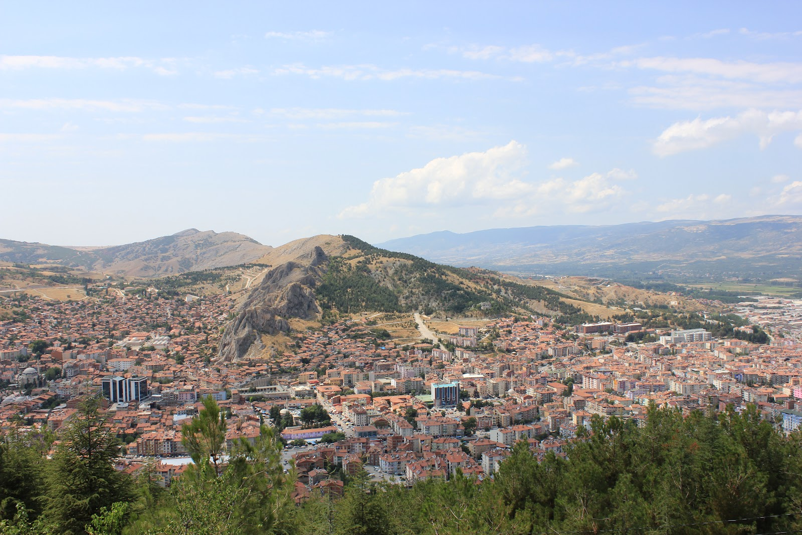 Tokat şehir merkezi panoraması.